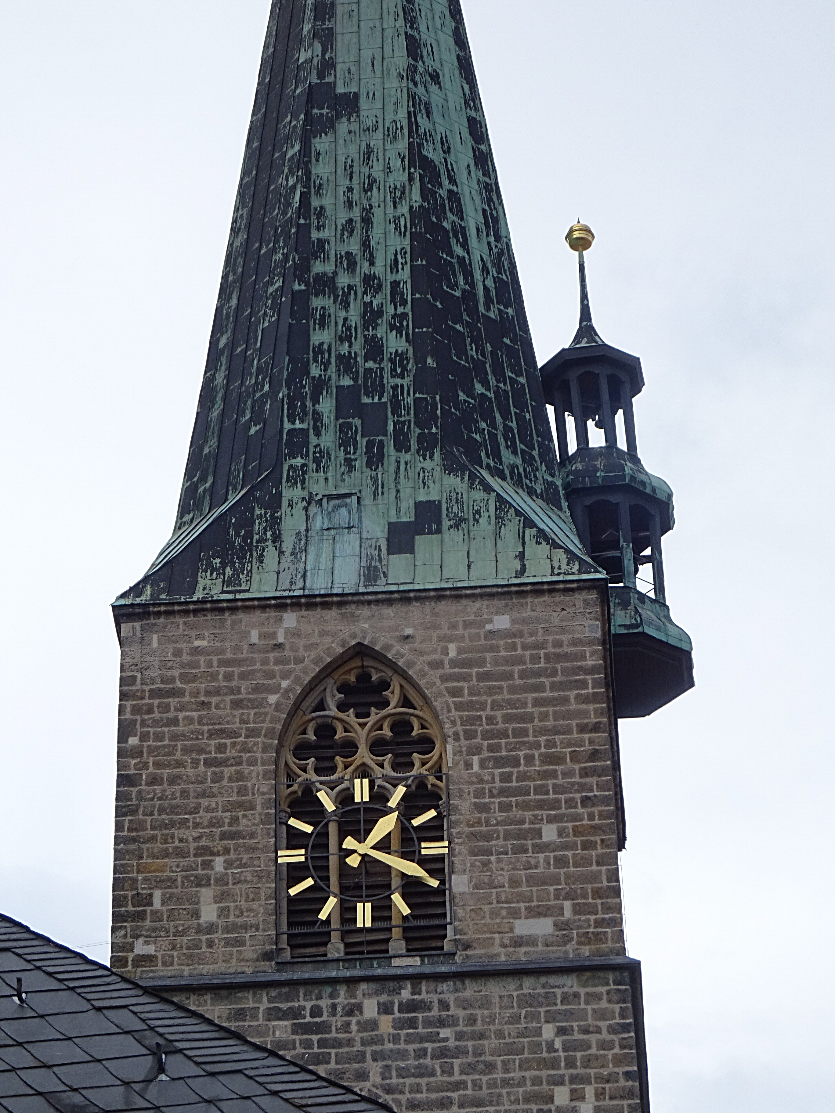 Saigertürmchen am Nordturm der Pfarrkirche St. Nikolai (Quedlinburg). Er enthält das Schlagwerk für die Turmuhr.